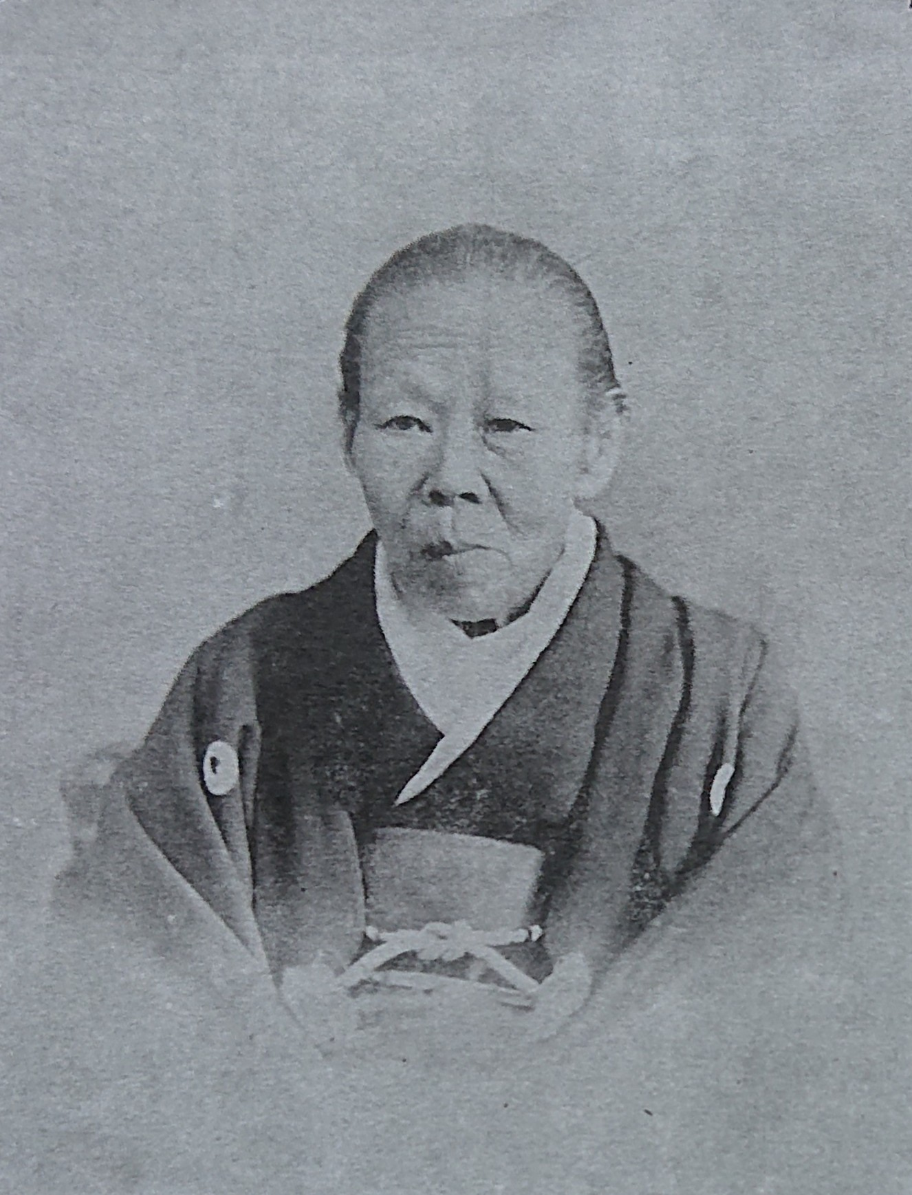 伊藤琴子肖像写真(伊藤博文母親)